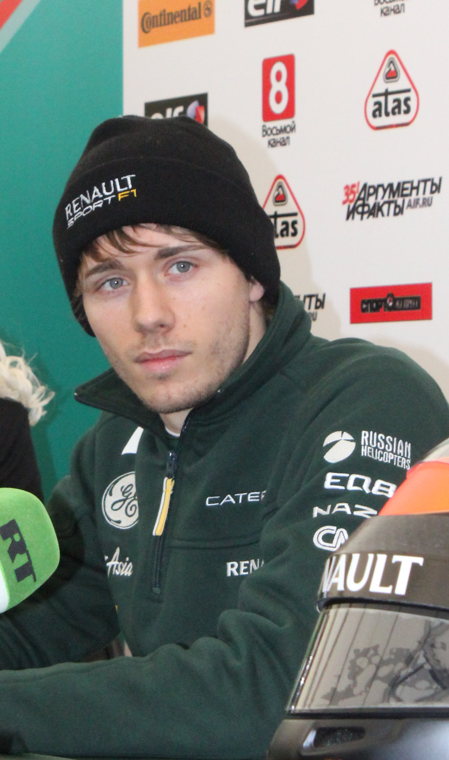 Шарль Пик на Гонке Звёзд "За рулём" Москва 23.02.2013